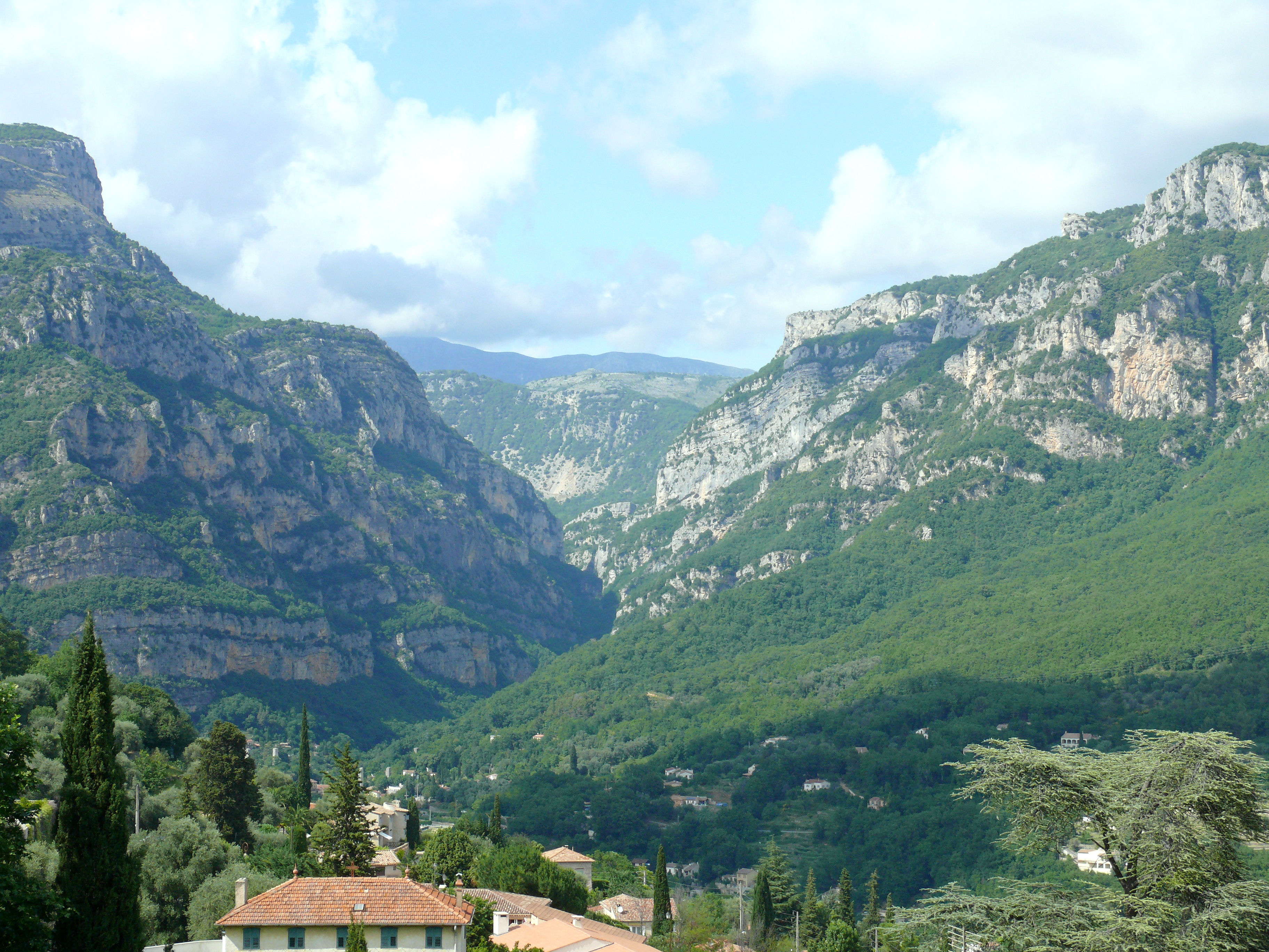 Le Bar-sur-Loup - Une vue des gorges du Loup de la place de l'Eglise